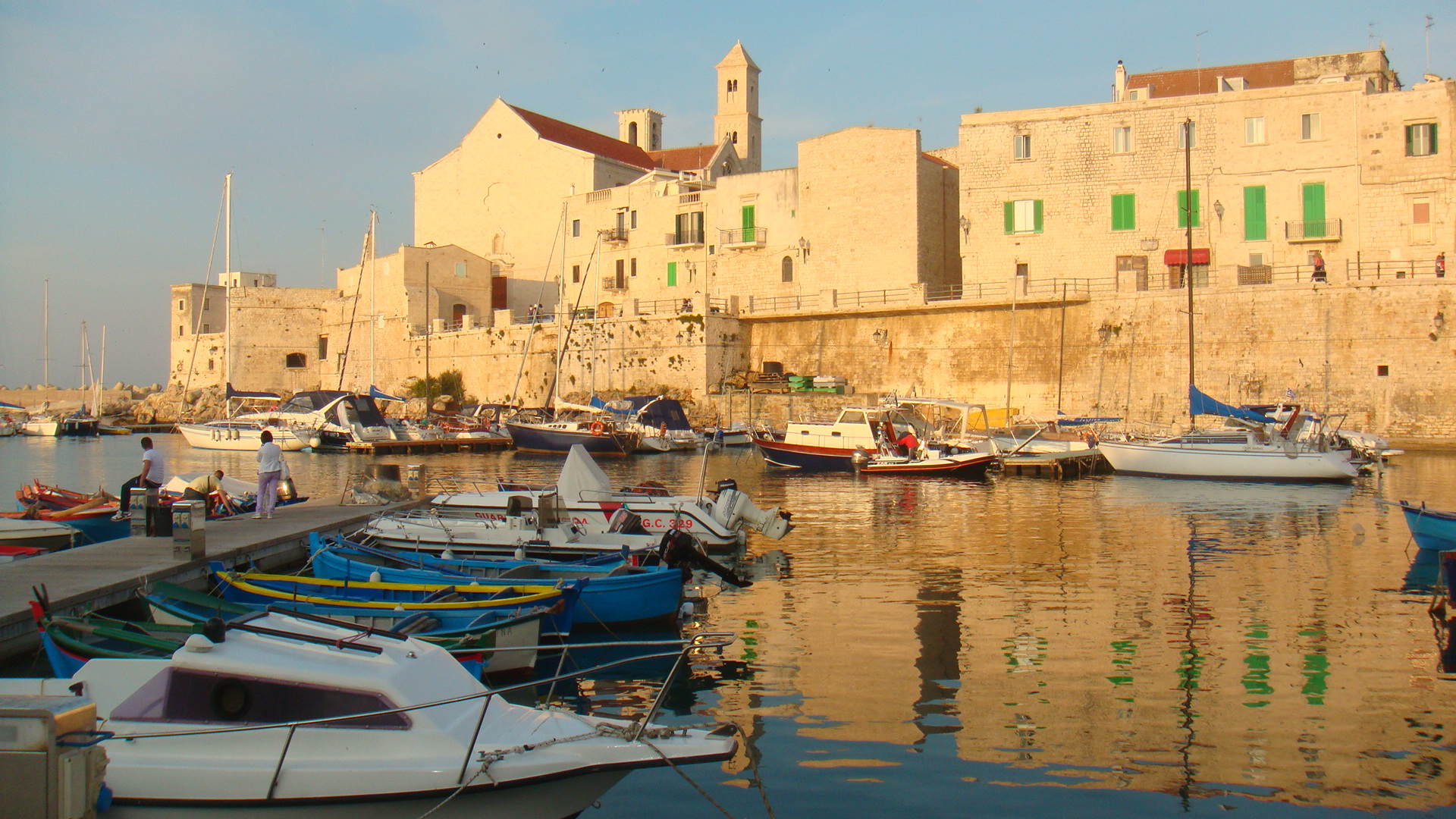 rasky, opera propria, Porto di Giovinazzo